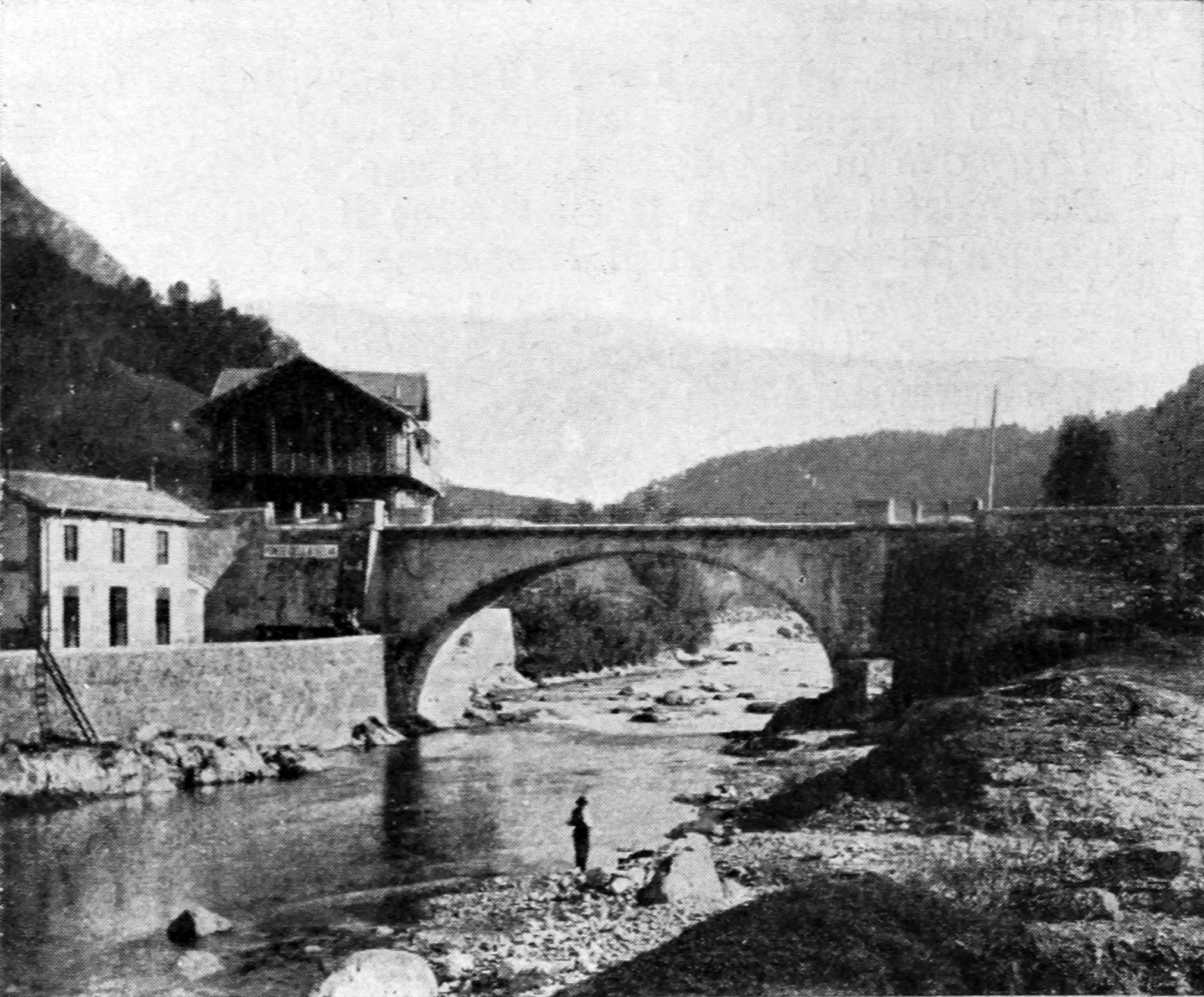 Immagine dal libro Bergamo e sue valli, Brescia e sue valli, Lago d'Iseo, Valcamonica, Società Anonima Guide Lampugnani, Milano, 1900 - Ponte della Selva